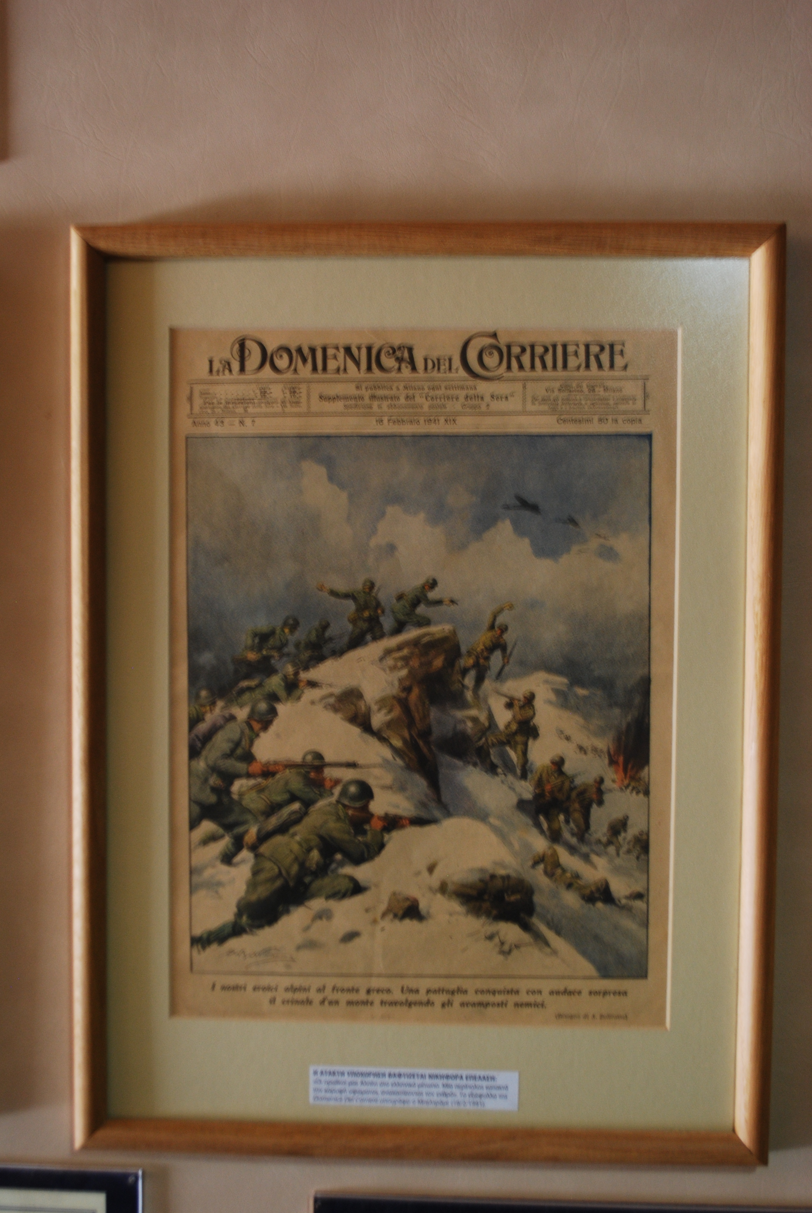 Vue du Grand Météore.